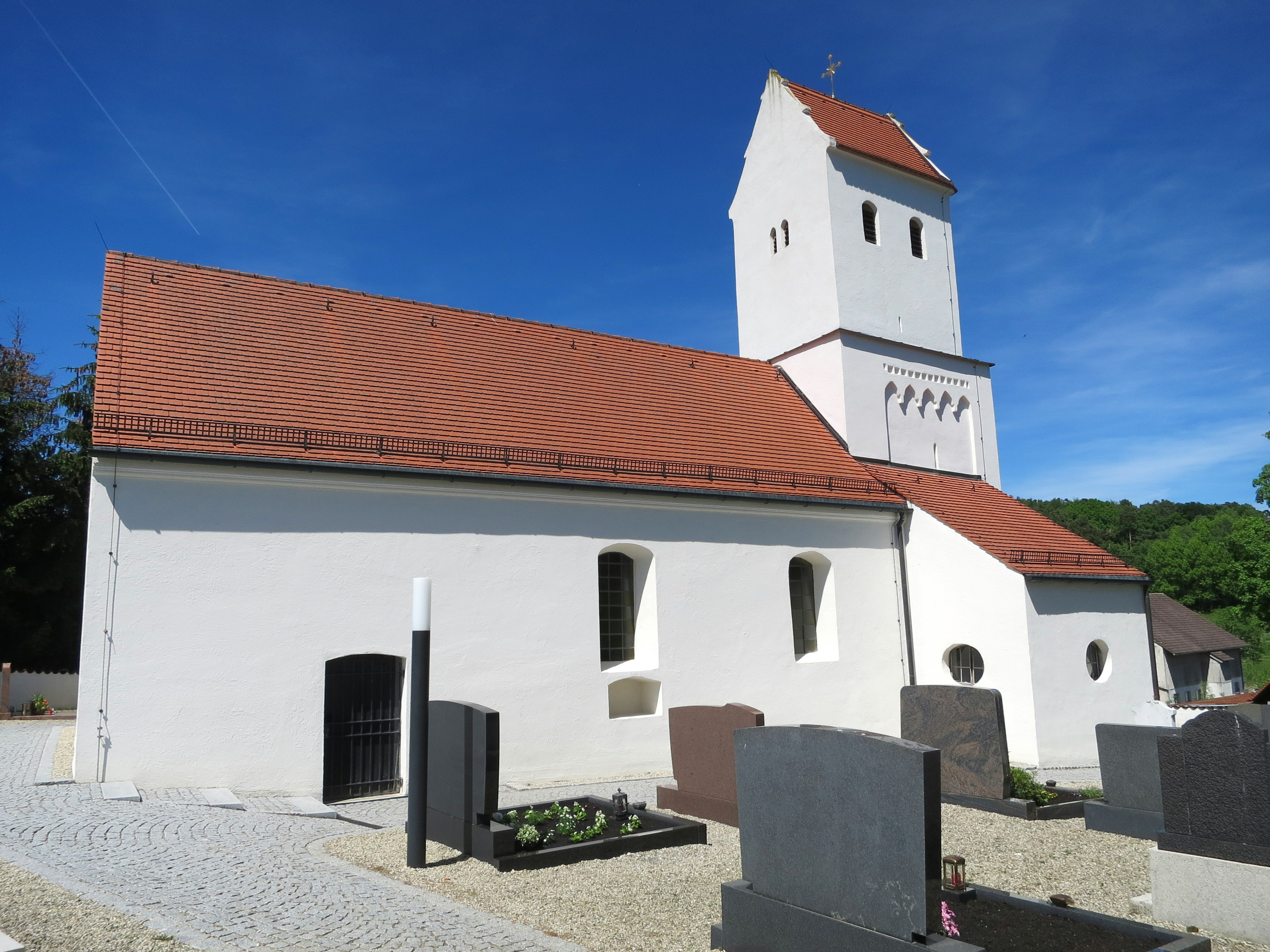 Katholische Filialkirche St. Nikolaus im OT Aufham der Gemeinde Schweitenkirchen, Landkreis Pfaffenhofen an der Ilm.